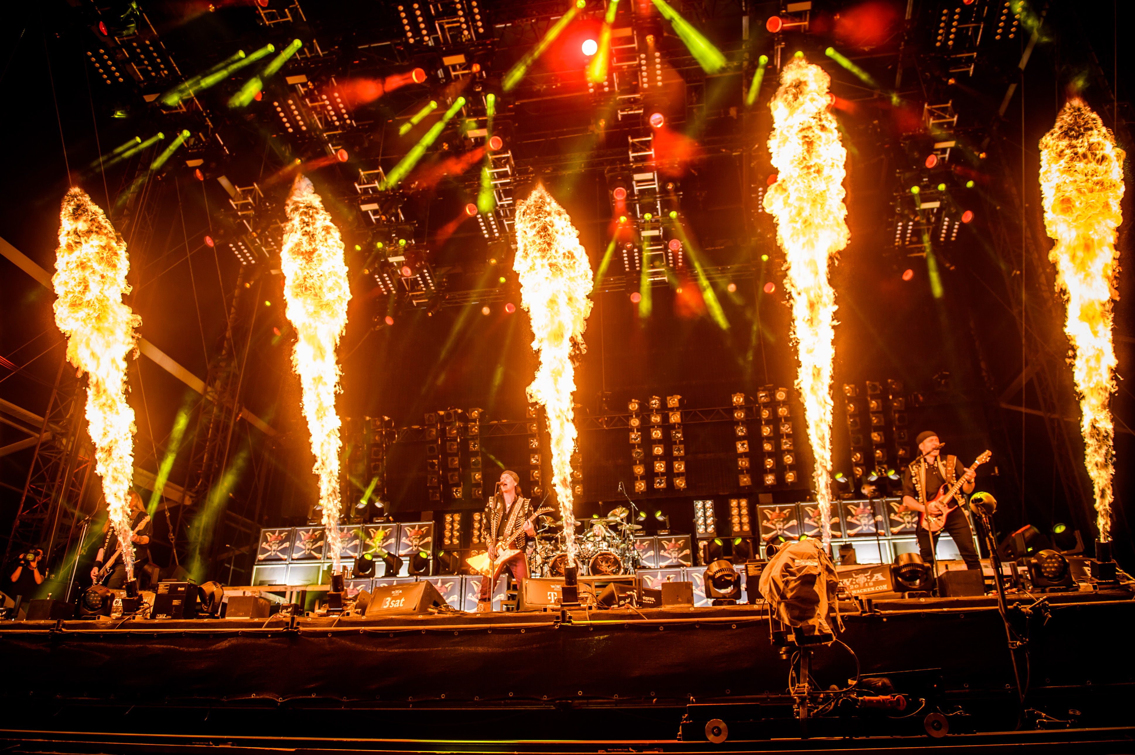 'Wacken Open Air 2018': 'Running Wild'